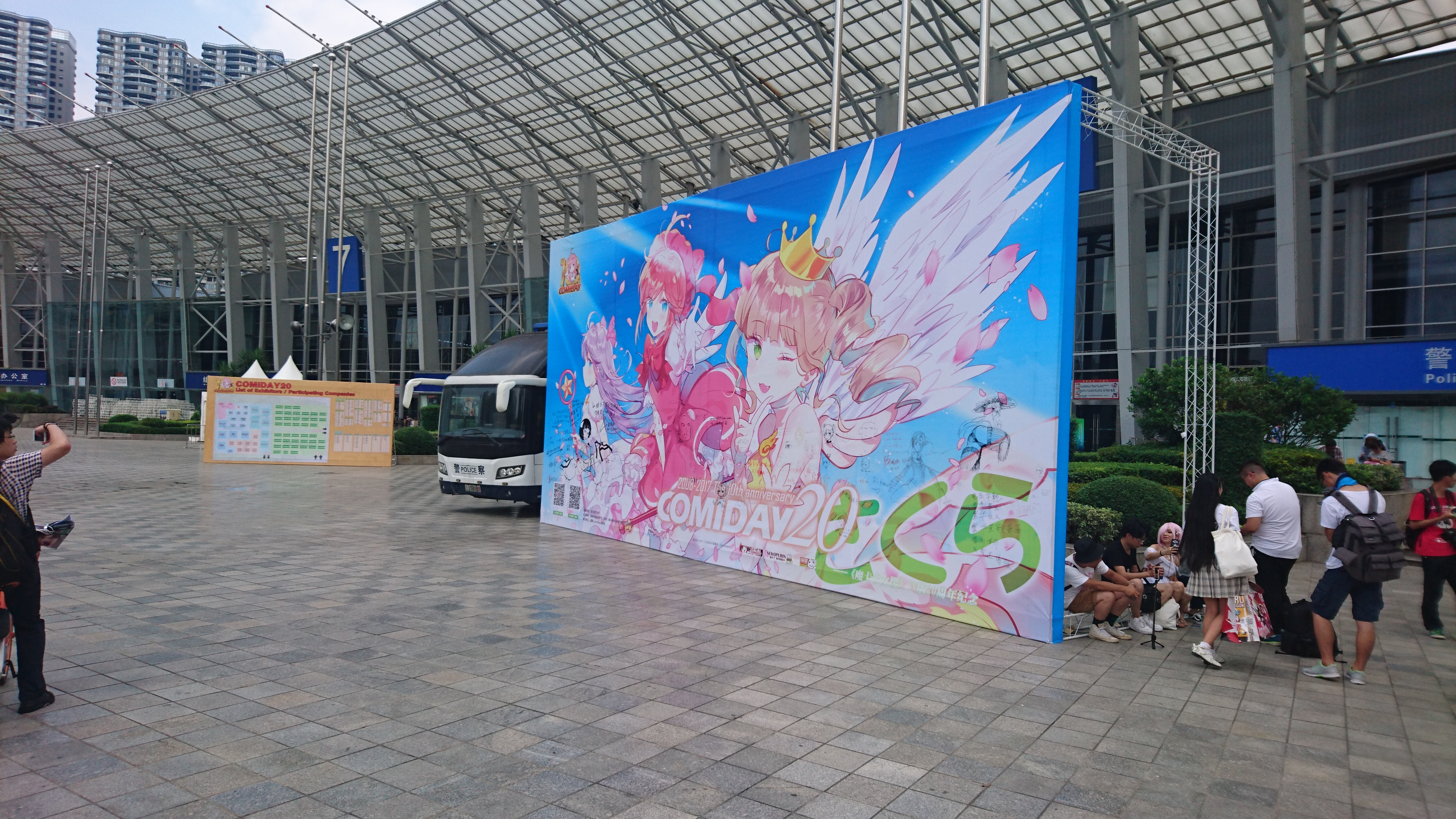 中文（中国大陆）: Comiday20的场外展板